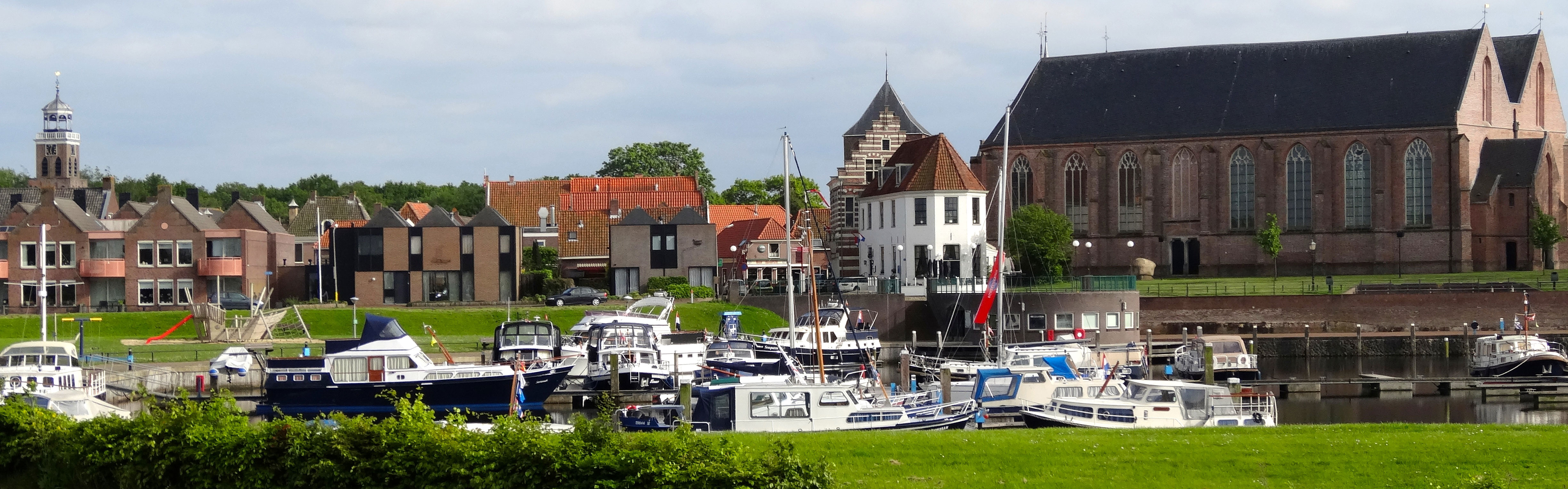 Zicht op Vollenhove met de Grote of Sint-Nicolaaskerk (rechts) en de Kleine of Onze-Lieve-Vrouwekerk (links) en de jachthaven (voorgrond)